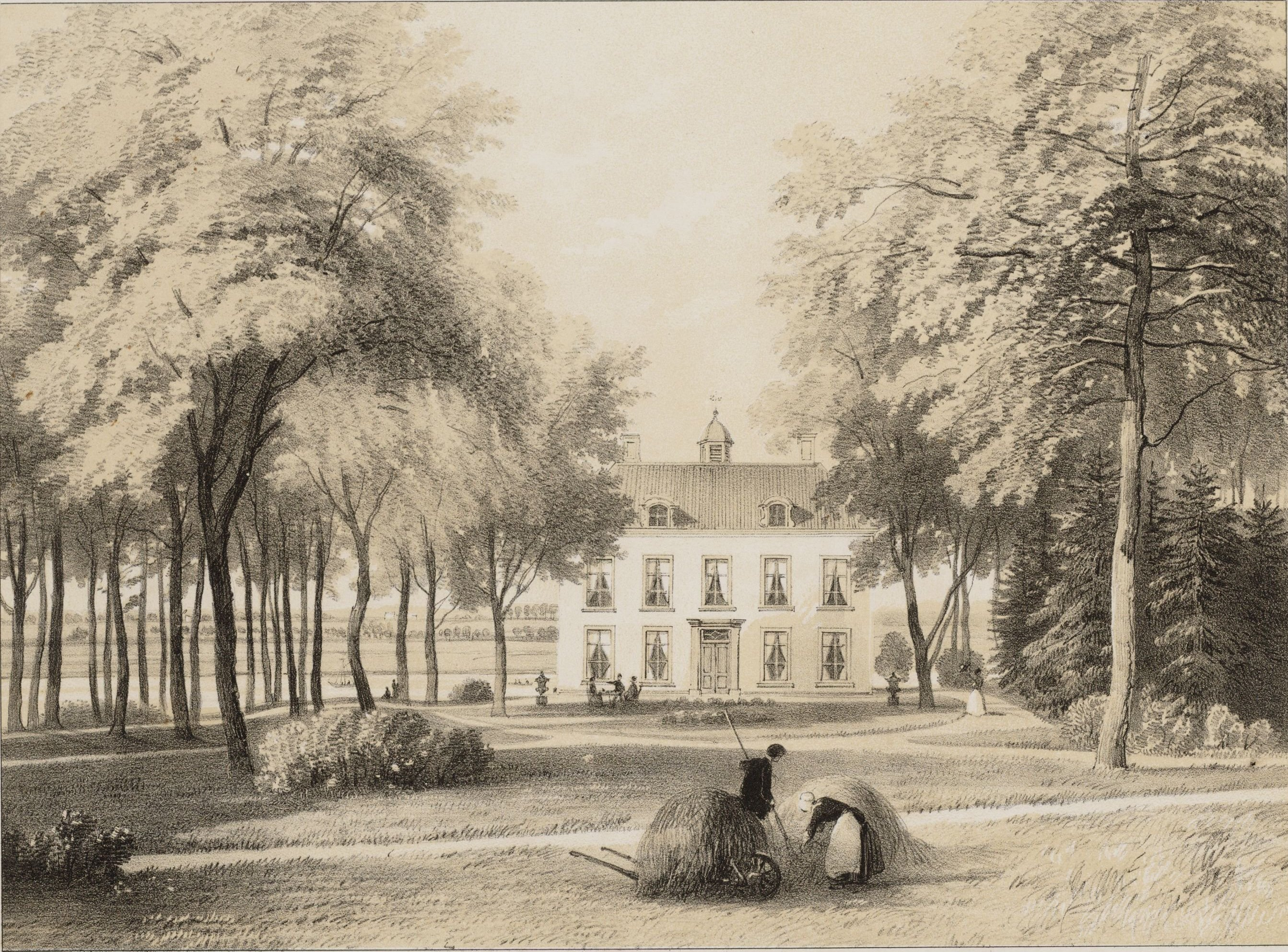 Hulkestein